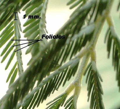 Enciclopedia Libre. Autor: Pablo Alberto Salguero Quiles. Categoría:Plantas (imagen)